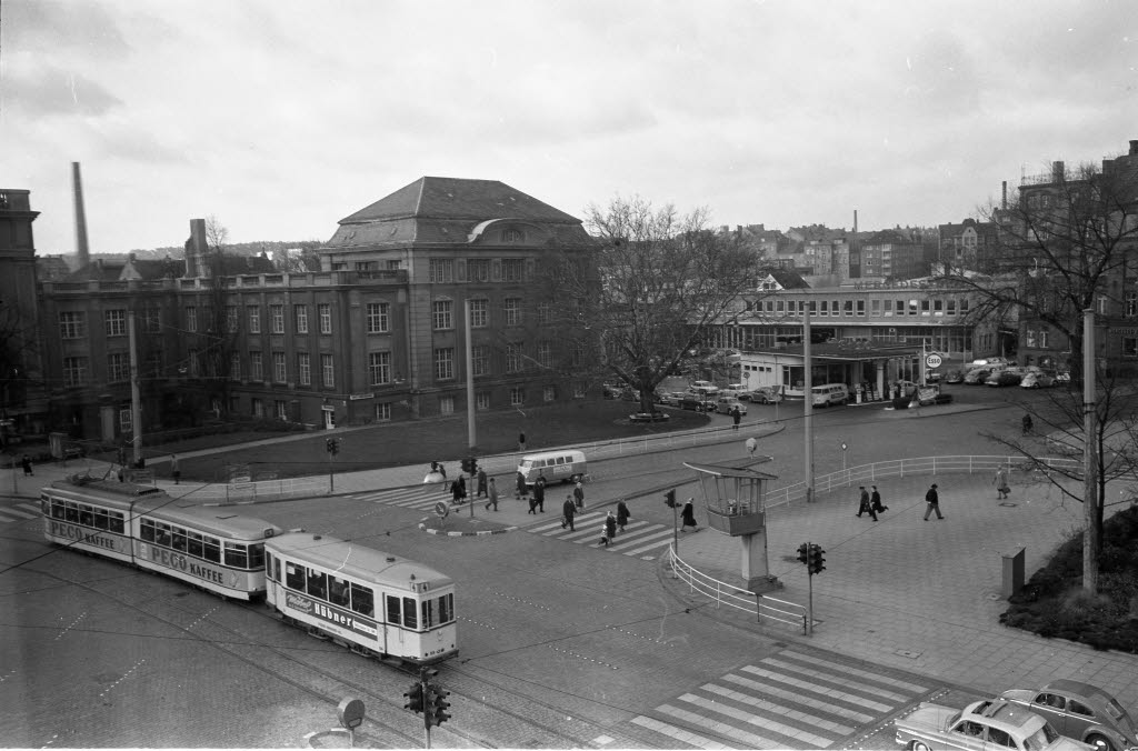 Blick von der Andreas-Gayk-Straße. Im Vordergrund links eine Straßenbahn der Linie 4. Im Hintergrund rechts die ESSO-Tankstelle im Ziegelteich 1-3.